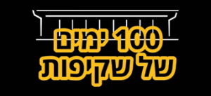 לוגו פרויקט 100 ימים של שקיפות של העיתונאי תומר אביטל